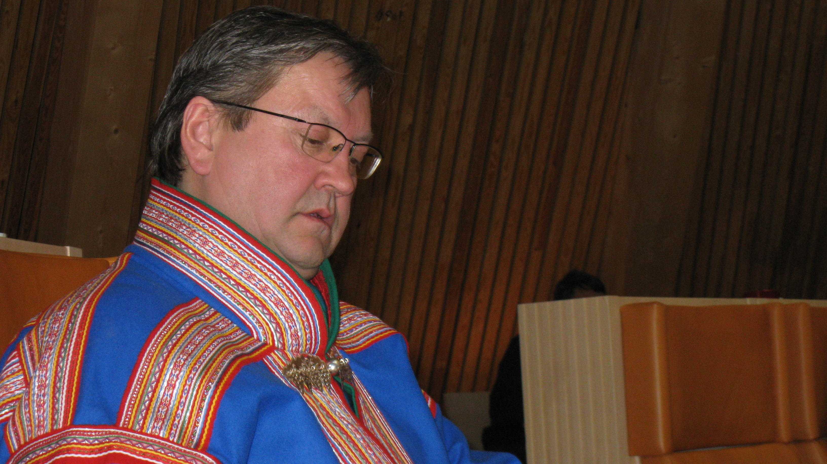 Sametingsrepresentant fra 1989 til 2009. Visepresodent i 2005-2007.